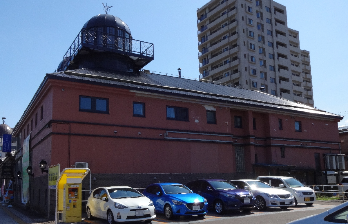 小樽運河工芸館 (Glass shop, Otaru, Japan)